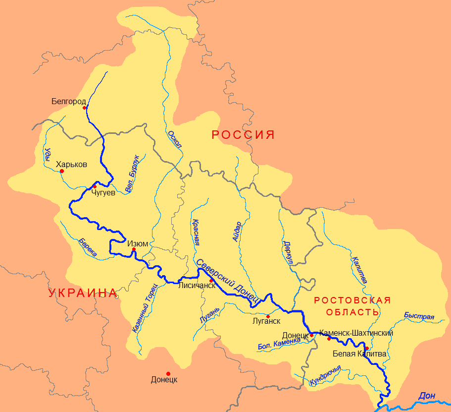 Схема бассейна Северского Донца